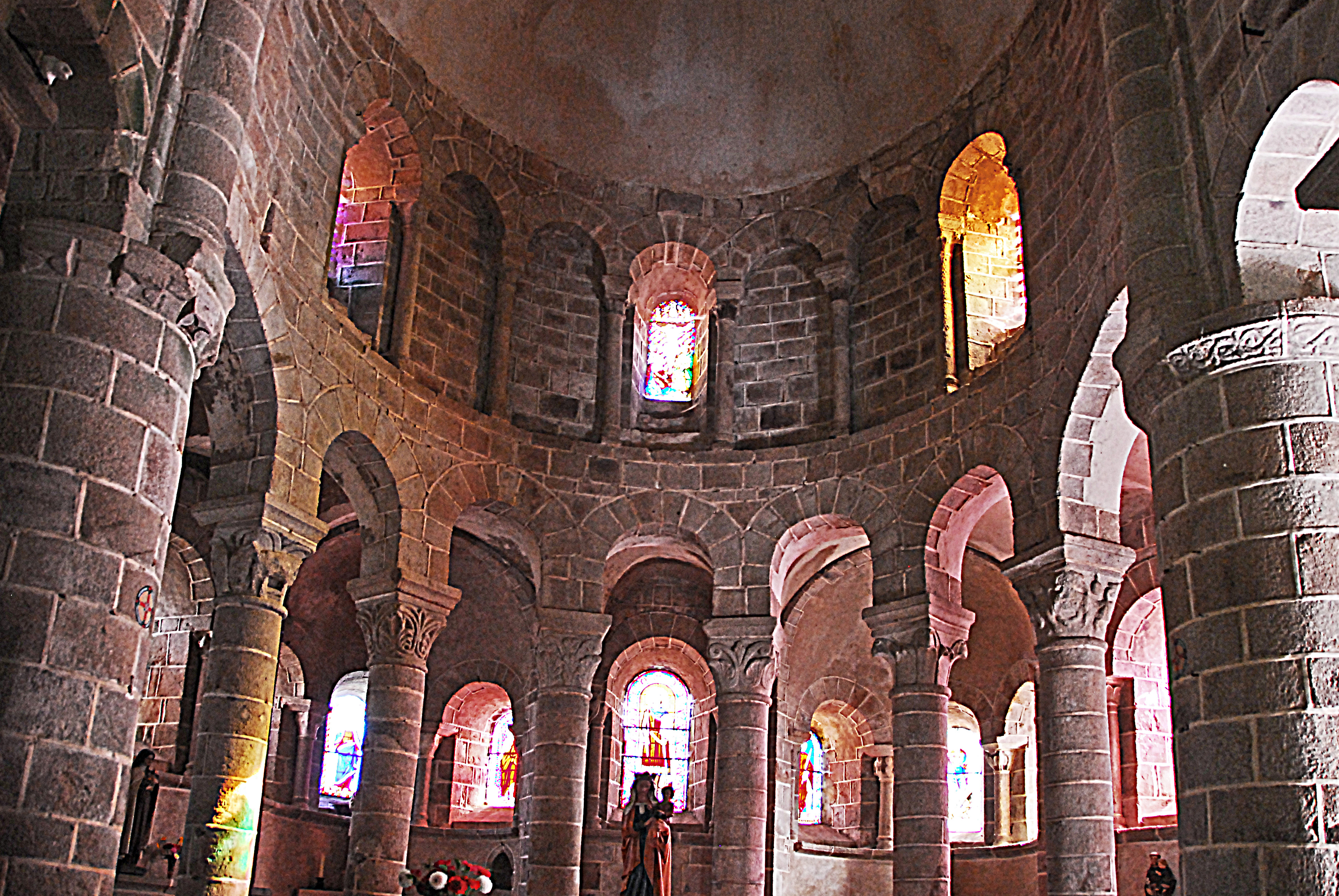 N.-D. de Châtel-Montagne, Chorapsis Mittelzone